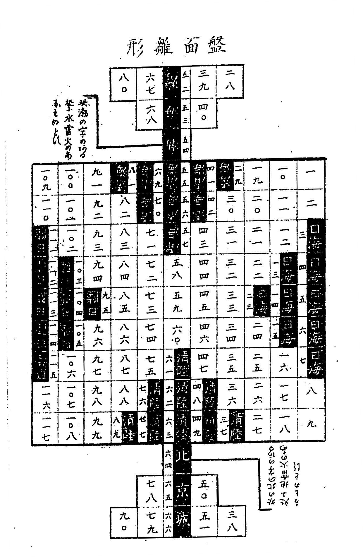 中文（台灣）: 征清將棋座標圖